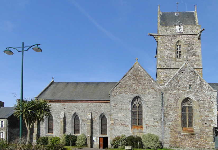 Eglise de Lingreville